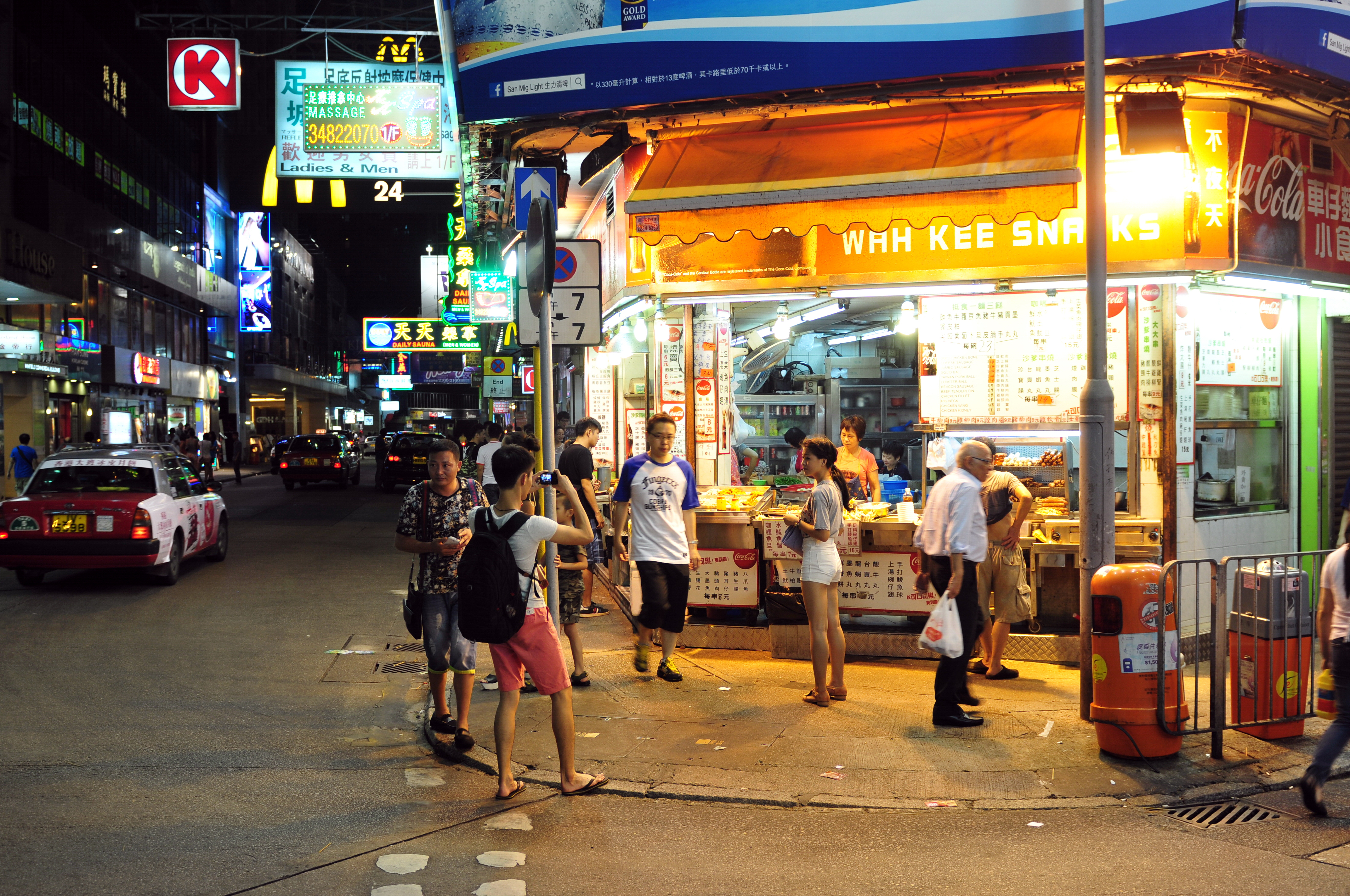 Wikimania 2013 Hongkong